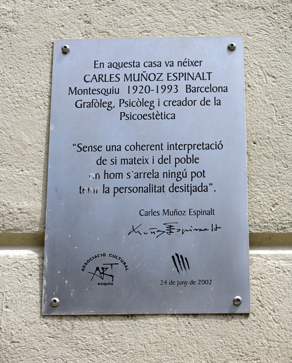 Placa de la plaça Emili Juncadella de Montesquiu, en commemoració del lloc de naixement de Carles Muñoz Espinalt